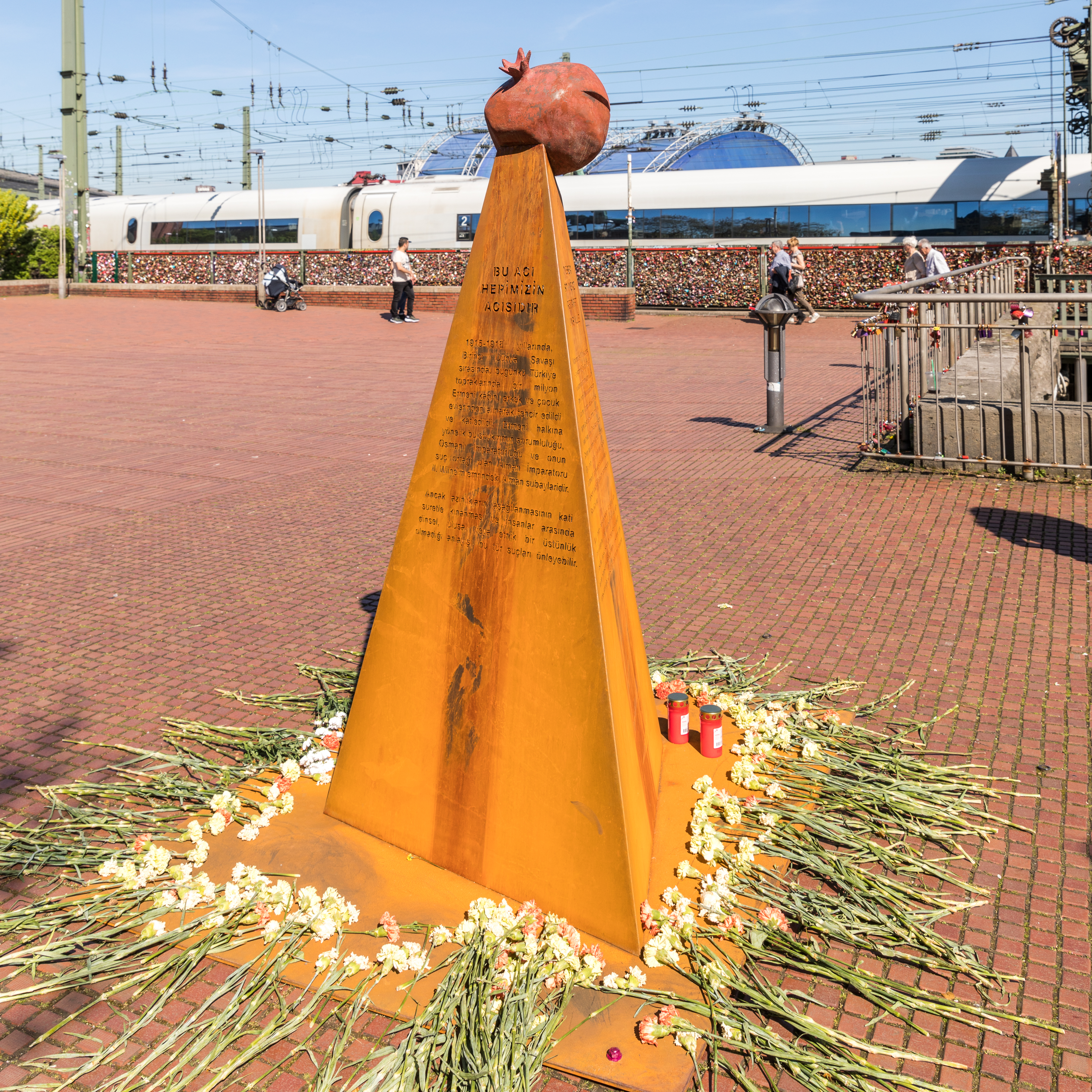 Mahnmal zu Völkermord an Armeniern, linksrheinische Seite der Hohenzollernbrücke, Köln.